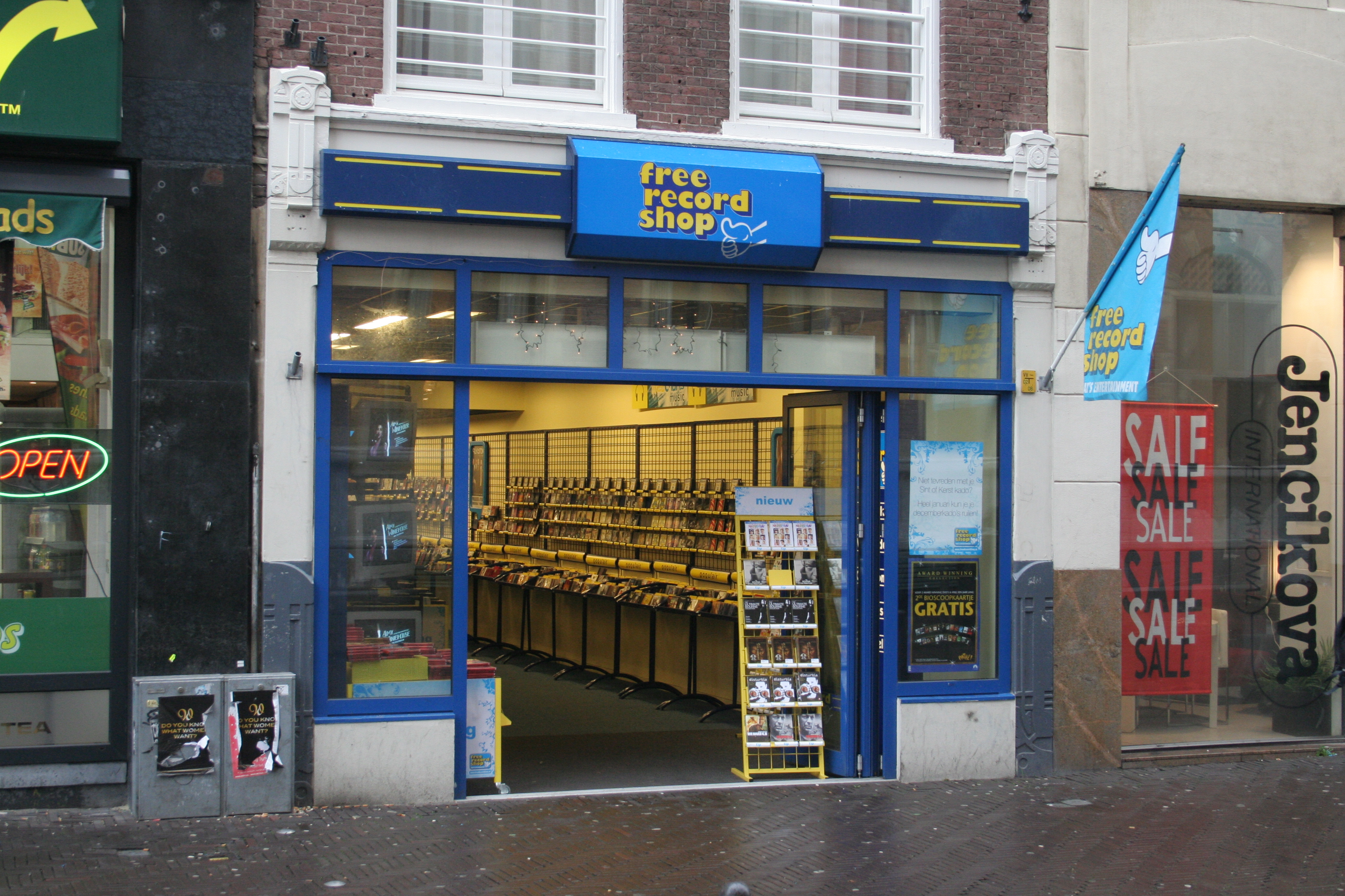 Free Record Shop-winkel te Den Haag